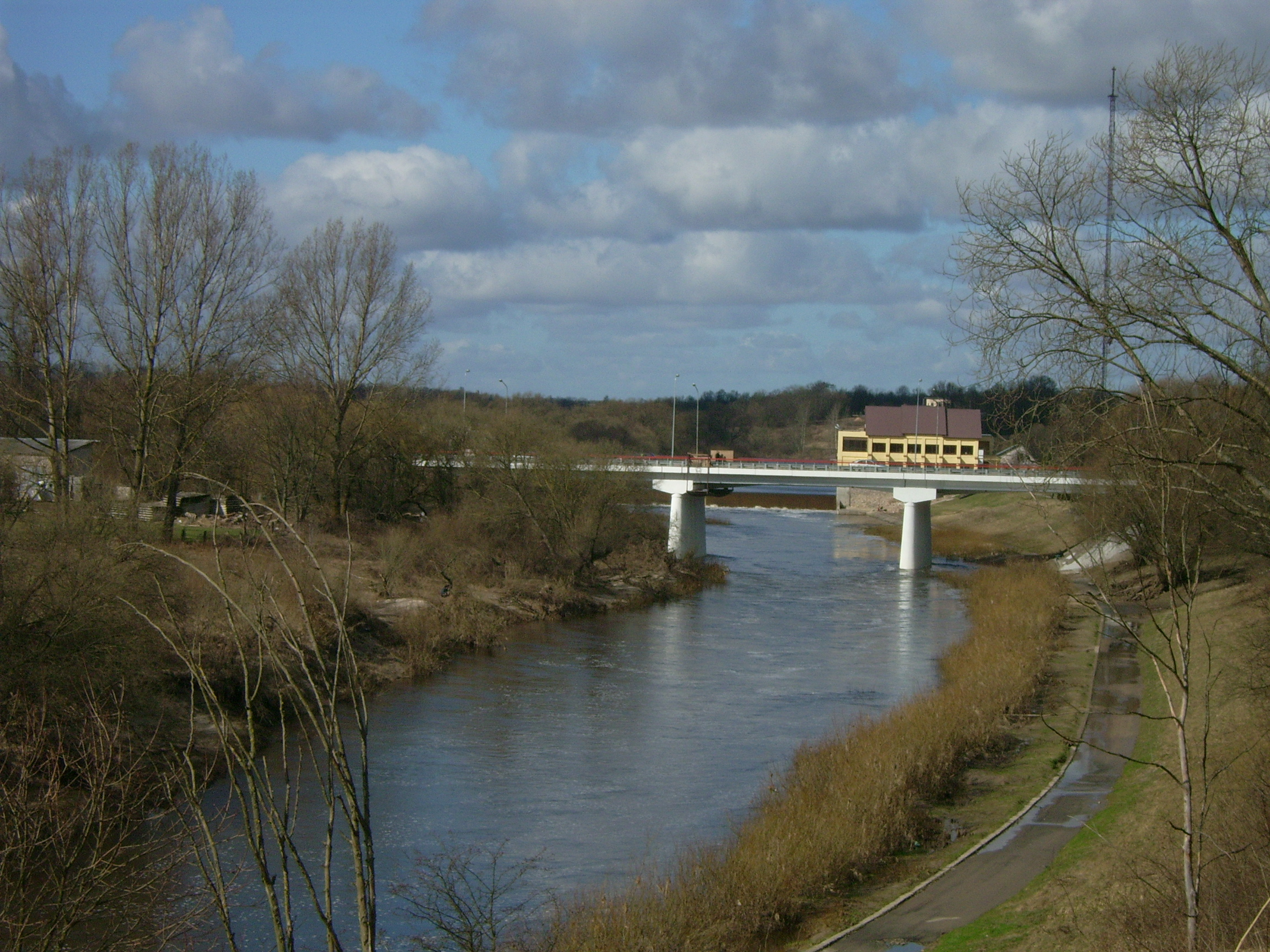 Tiltas per Jūrą Tauragėje